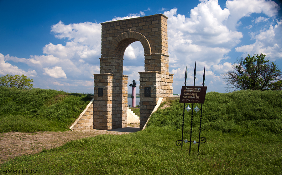 Каменская Сечь